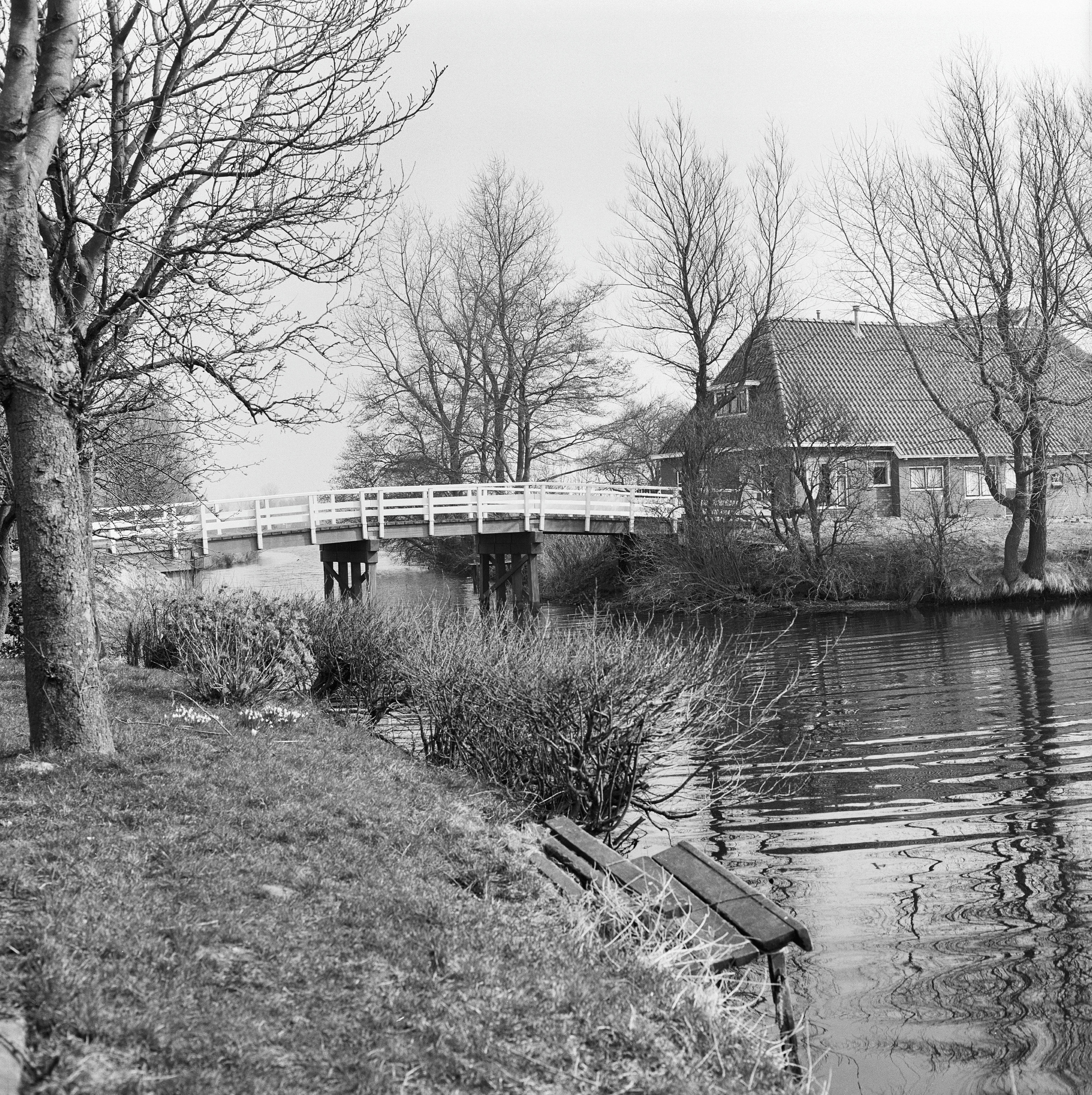 Goddeloze Tolhuis: overzicht